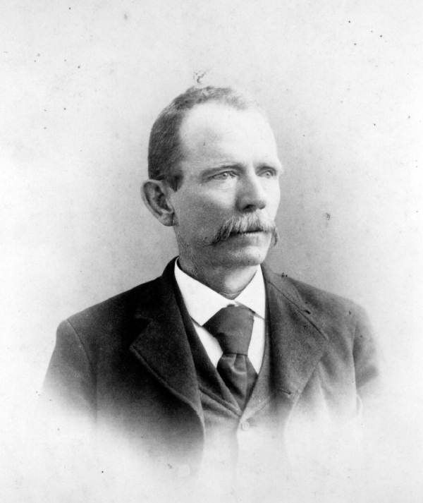 W. B. Henderson